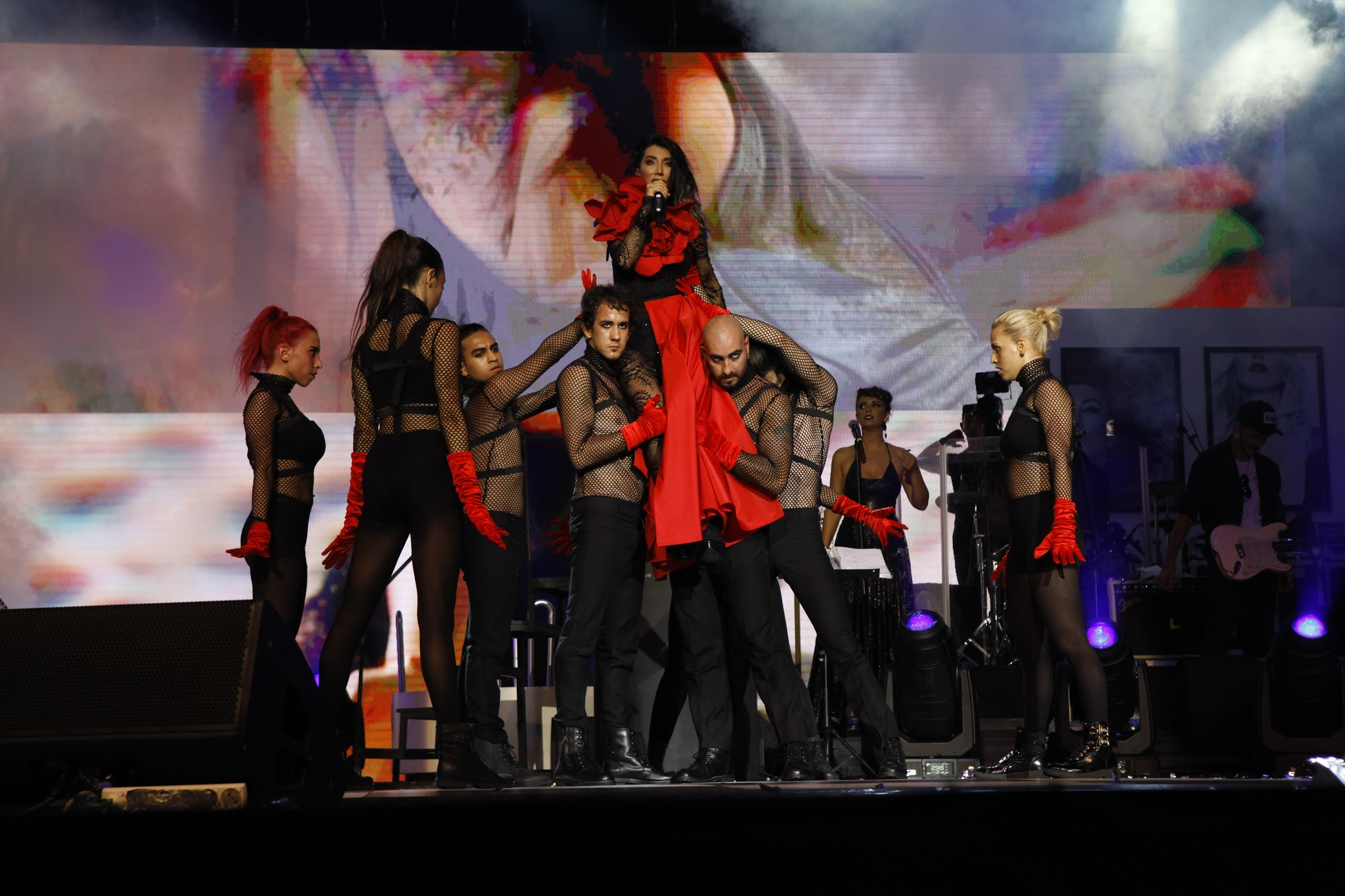 Hande Yener, 31 Temmuz 2015 tarihli Harbiye konserinde "Kışkışşş"ı söylerken.